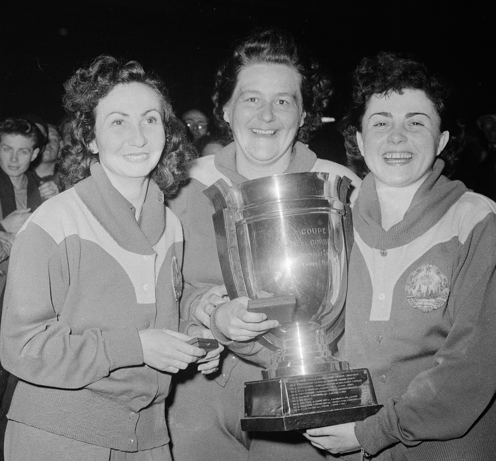 Tafeltennis Utrecht Roemeense damesploeg